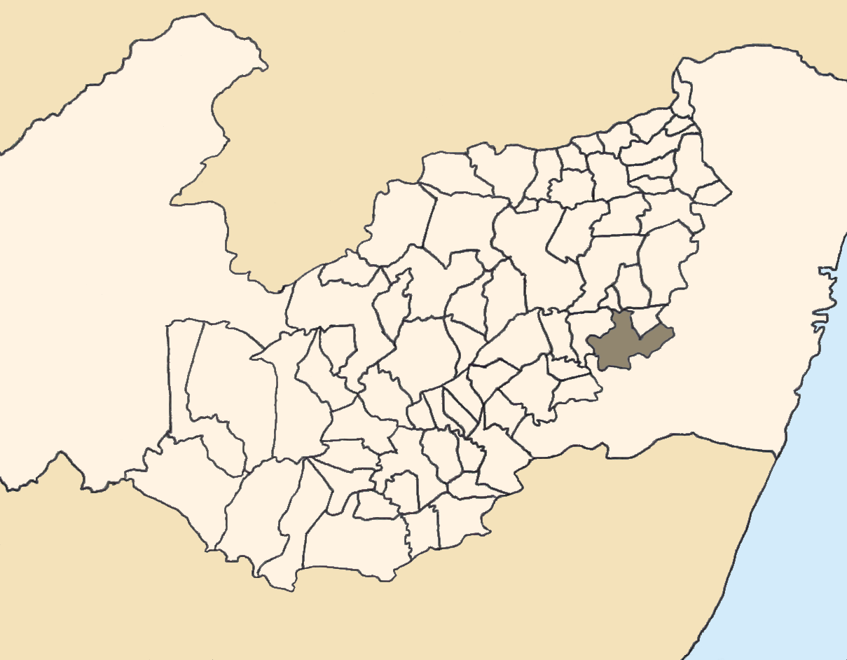 Mapa da mesorregião Agreste de Pernambuco (Brasil) subdivida em municípios. Em destaque, o município de Bonito. Map of the brazilian state of Pernambuco (mesorregião Agreste) showing the city of Bonito. Imagem tratada com o GIMP. Image made with GIMP.